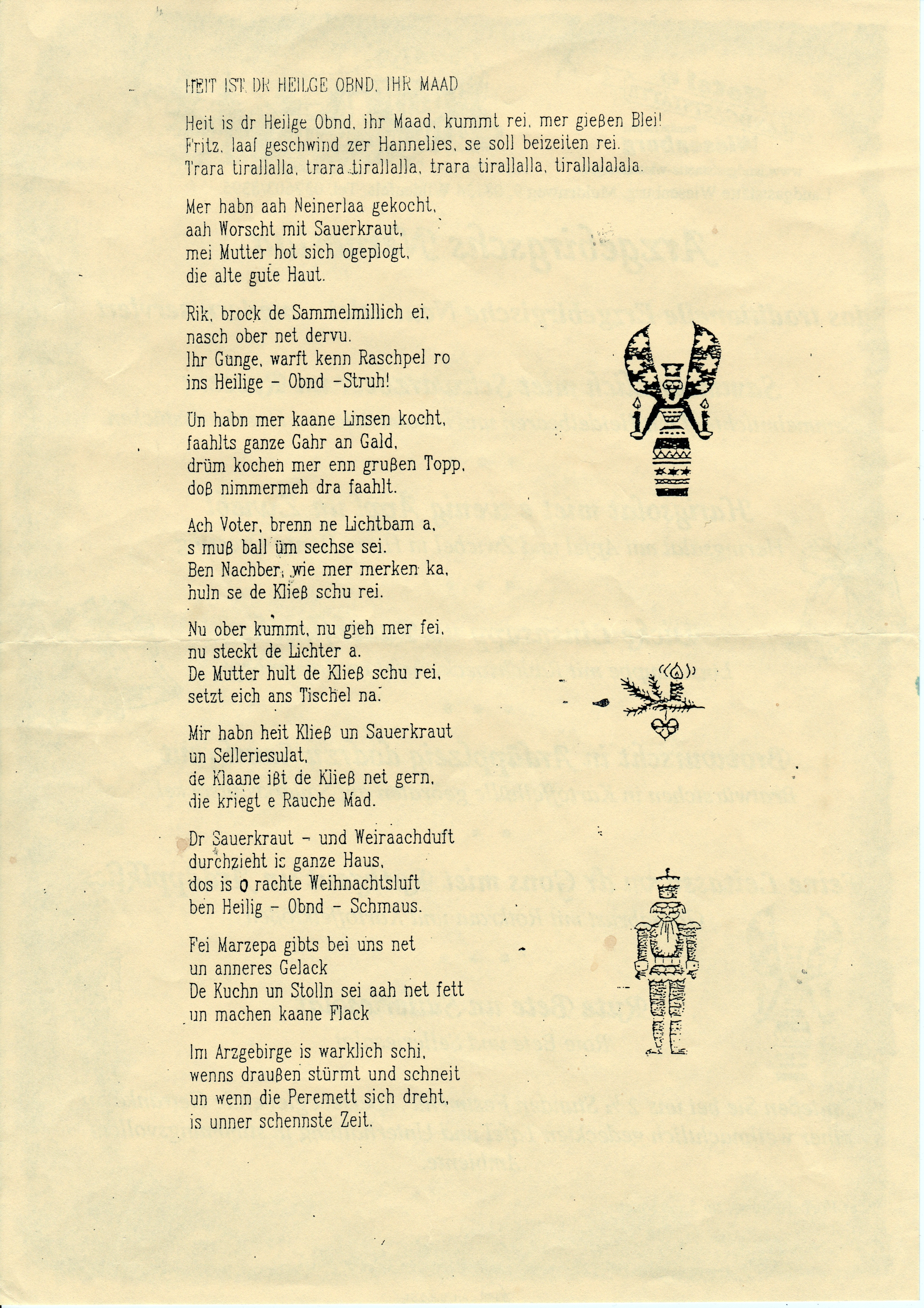 Erzgebirgisches Neunerlei-Menü